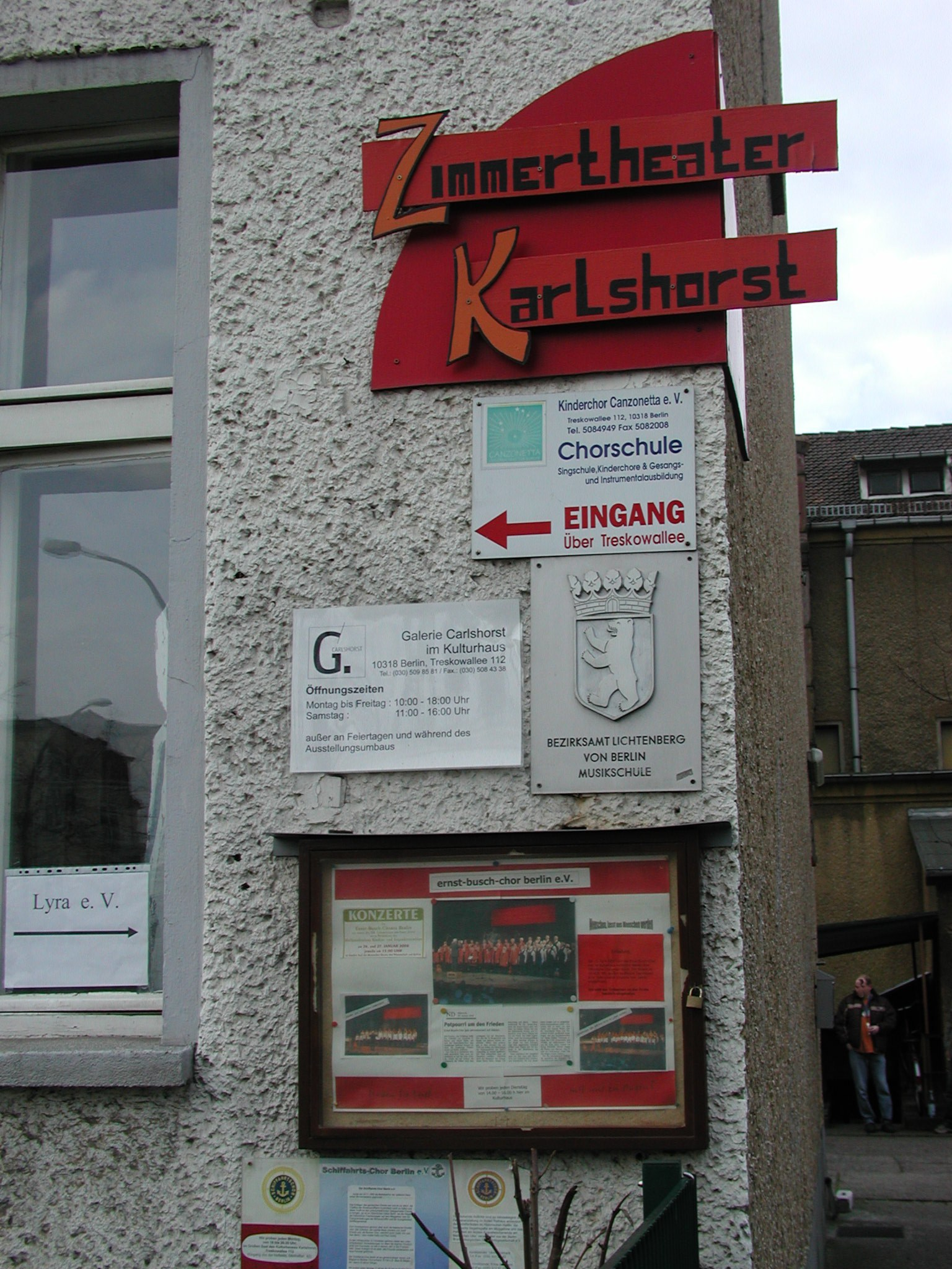 Musikschule Lichtenberg mit Tafel der Nutzer